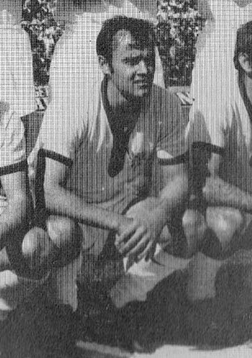 Il calciatore italiano Mario Brugnera all'U.S. Cagliari nella stagione 1969-70.